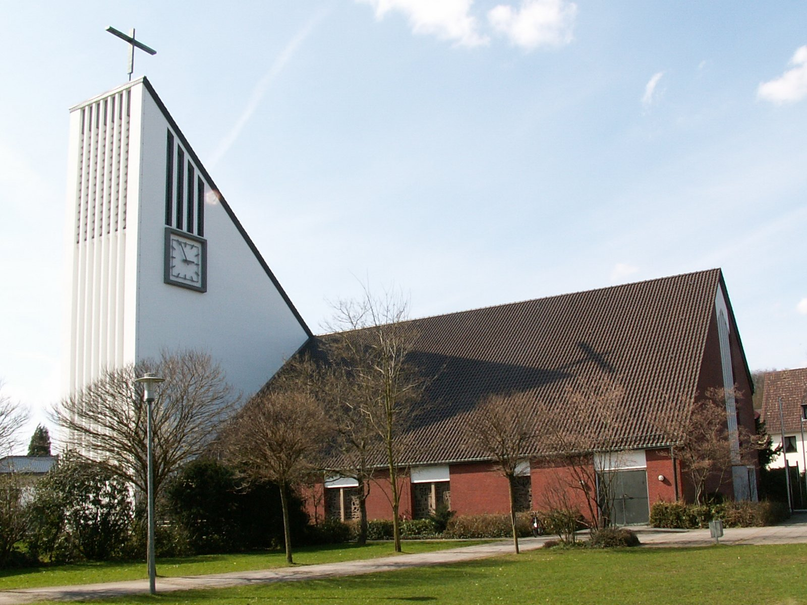 kath. Kirche St. Ansgar in Osnabrück, Stadtteil Nahne, Ansicht von Südosten